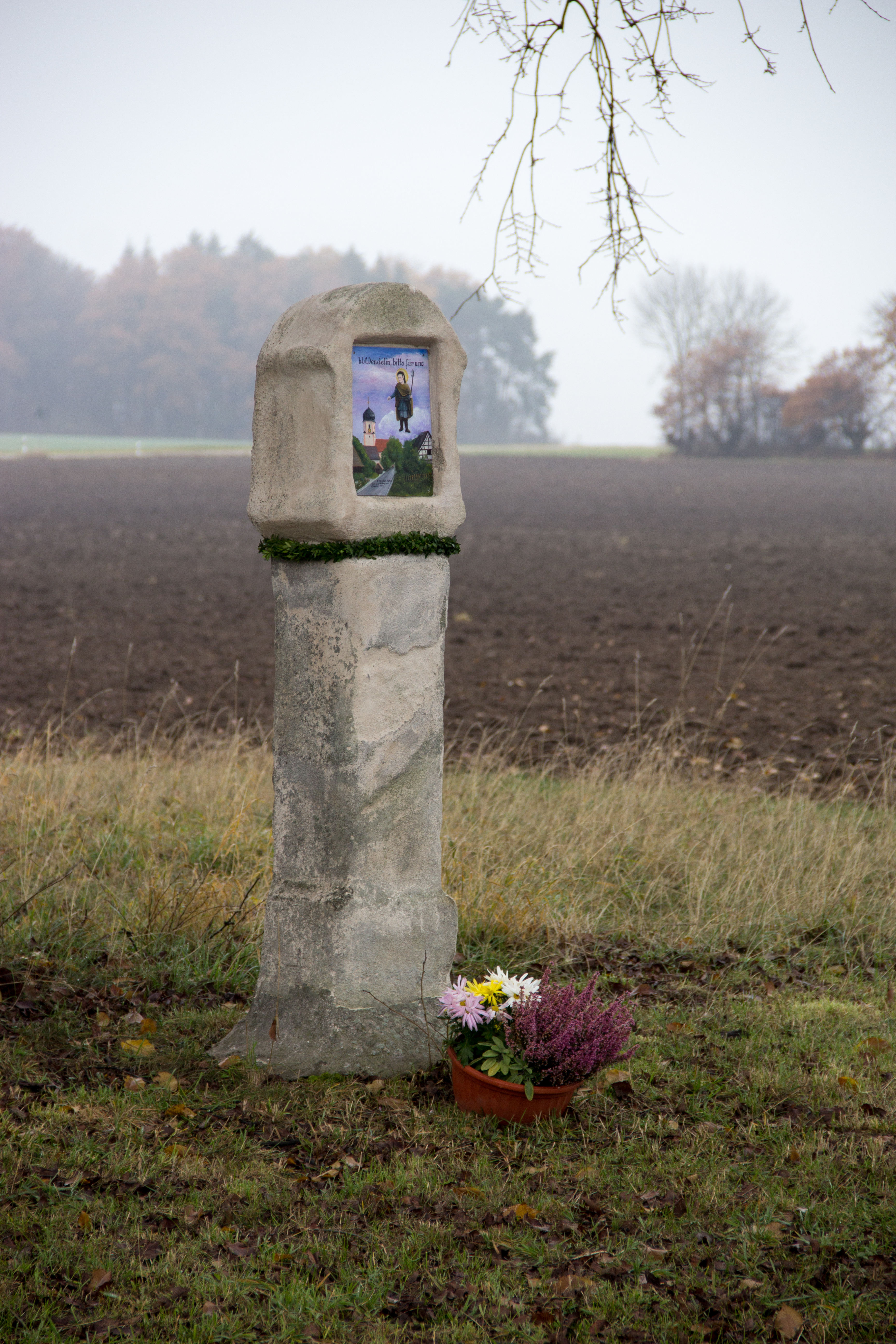 Steinkreuz,Sandstein, bei Jahrsdorf